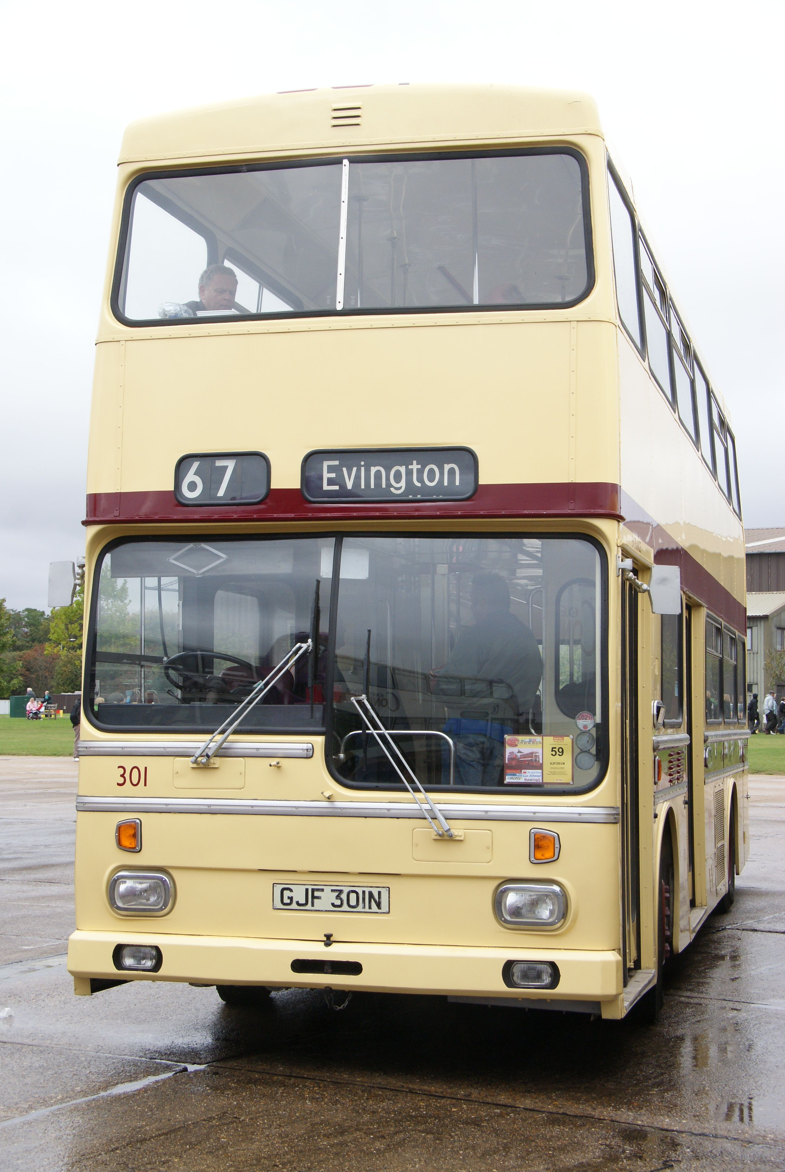 GJF301N-2 260910 CPS